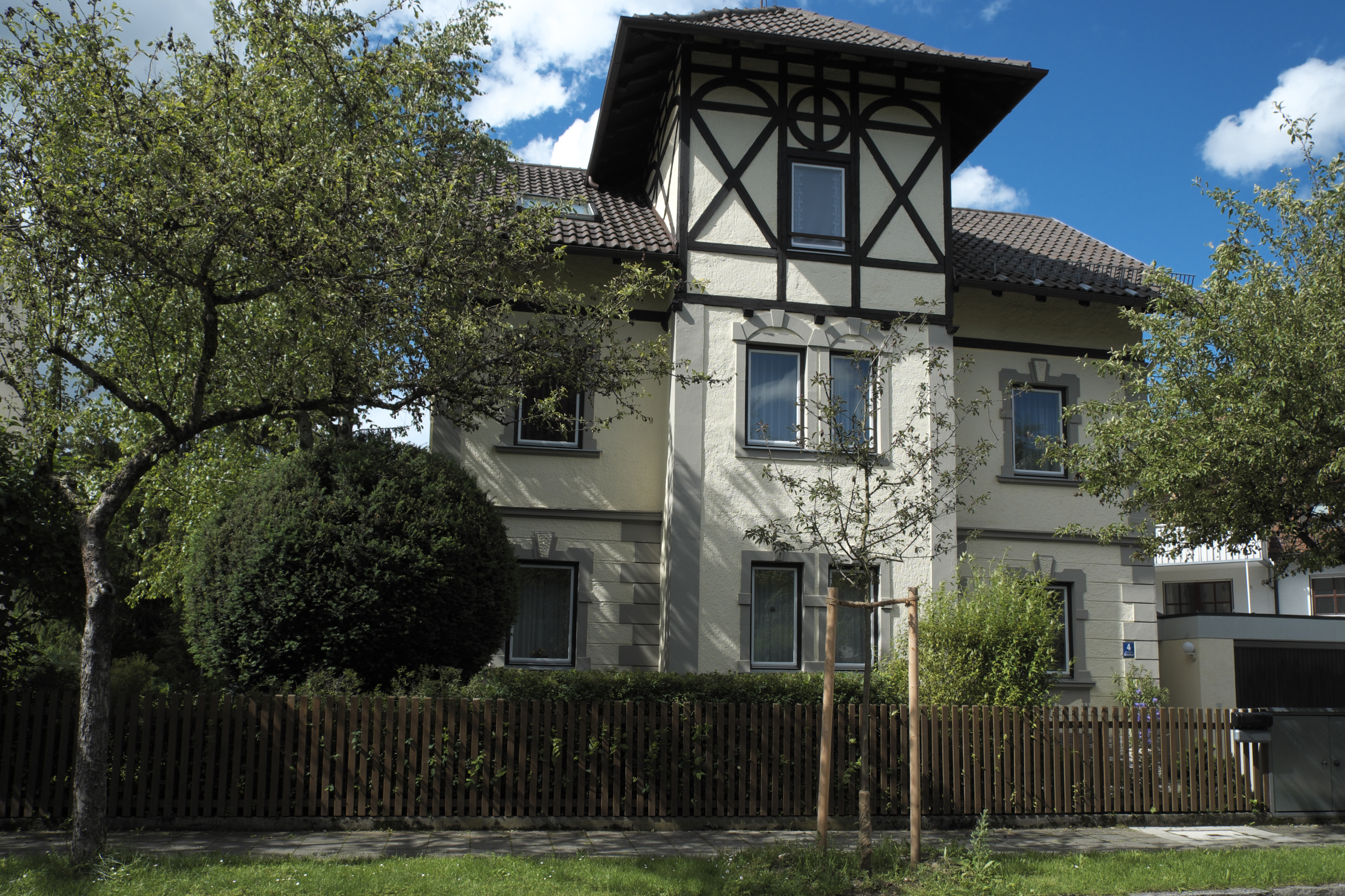 Villa in der Hofmillerstraße 4 in Obermenzing im Stadtbezirk Pasing-Obermenzing in München (Bayern/Deutschland)